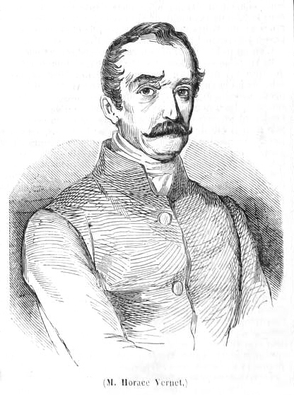 Horace Vernet, artist